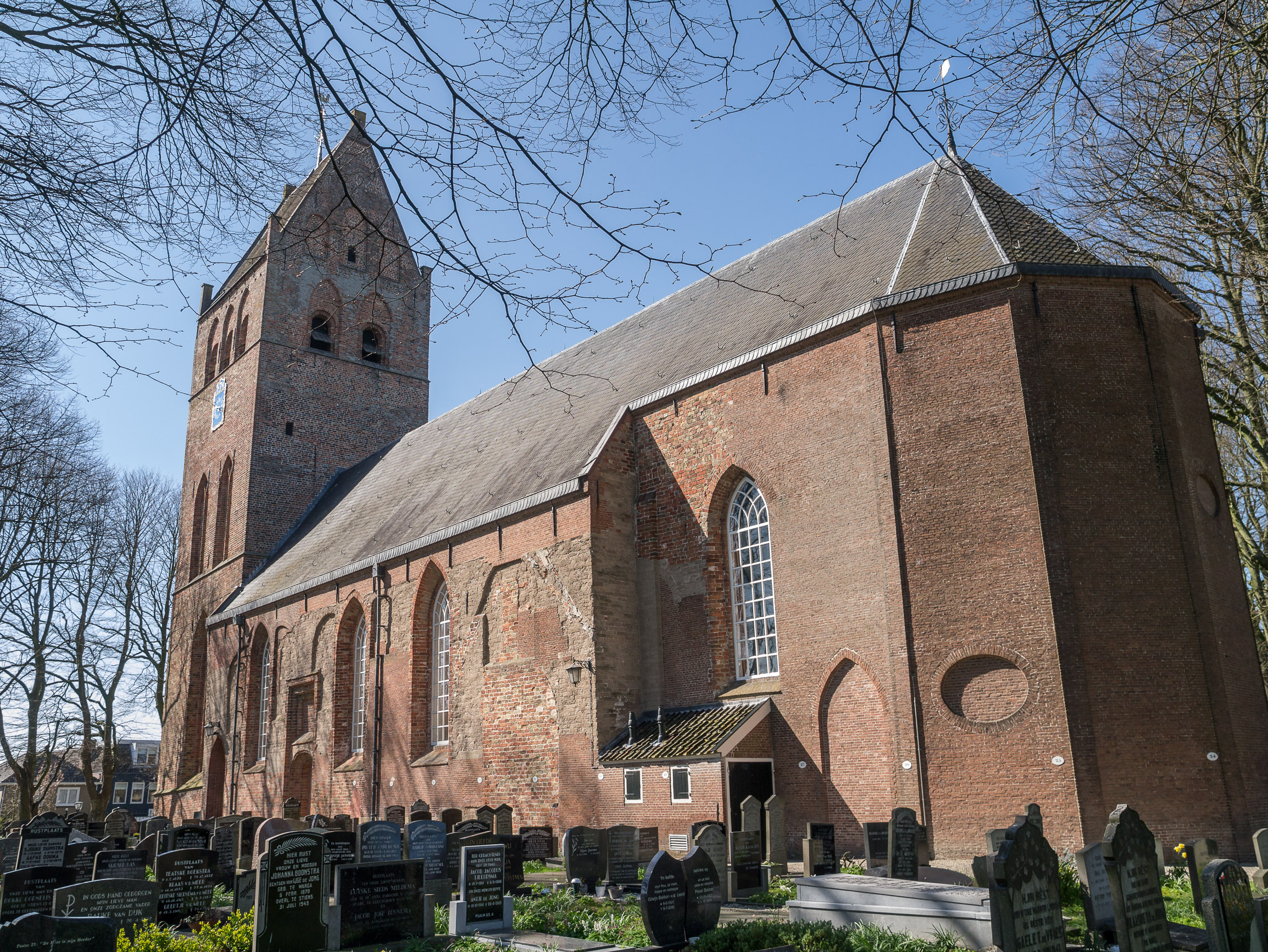 Kerk van Cornjum